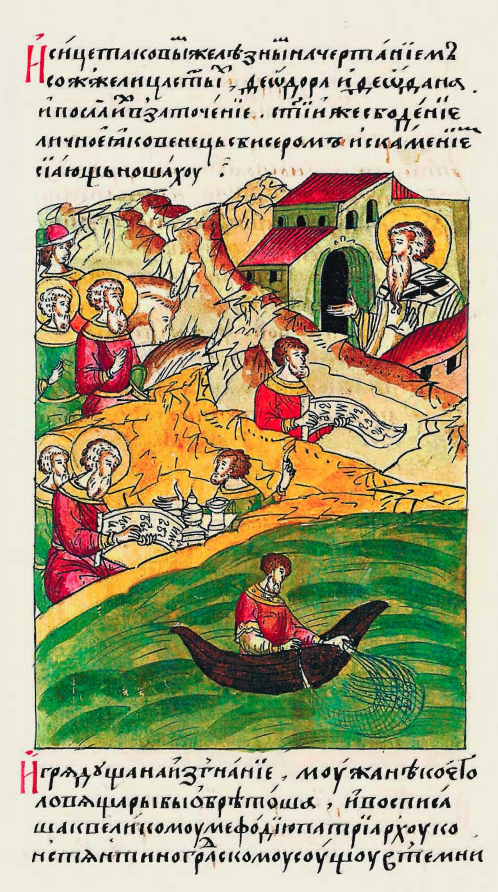 Лицевой летописный свод. Рыболов